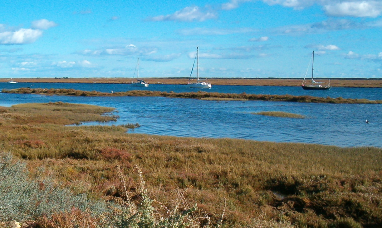 Ilha Tavira of Parque Natural de Ria Formosa (in Santa Luzia)